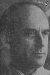 Lennart Bergquist